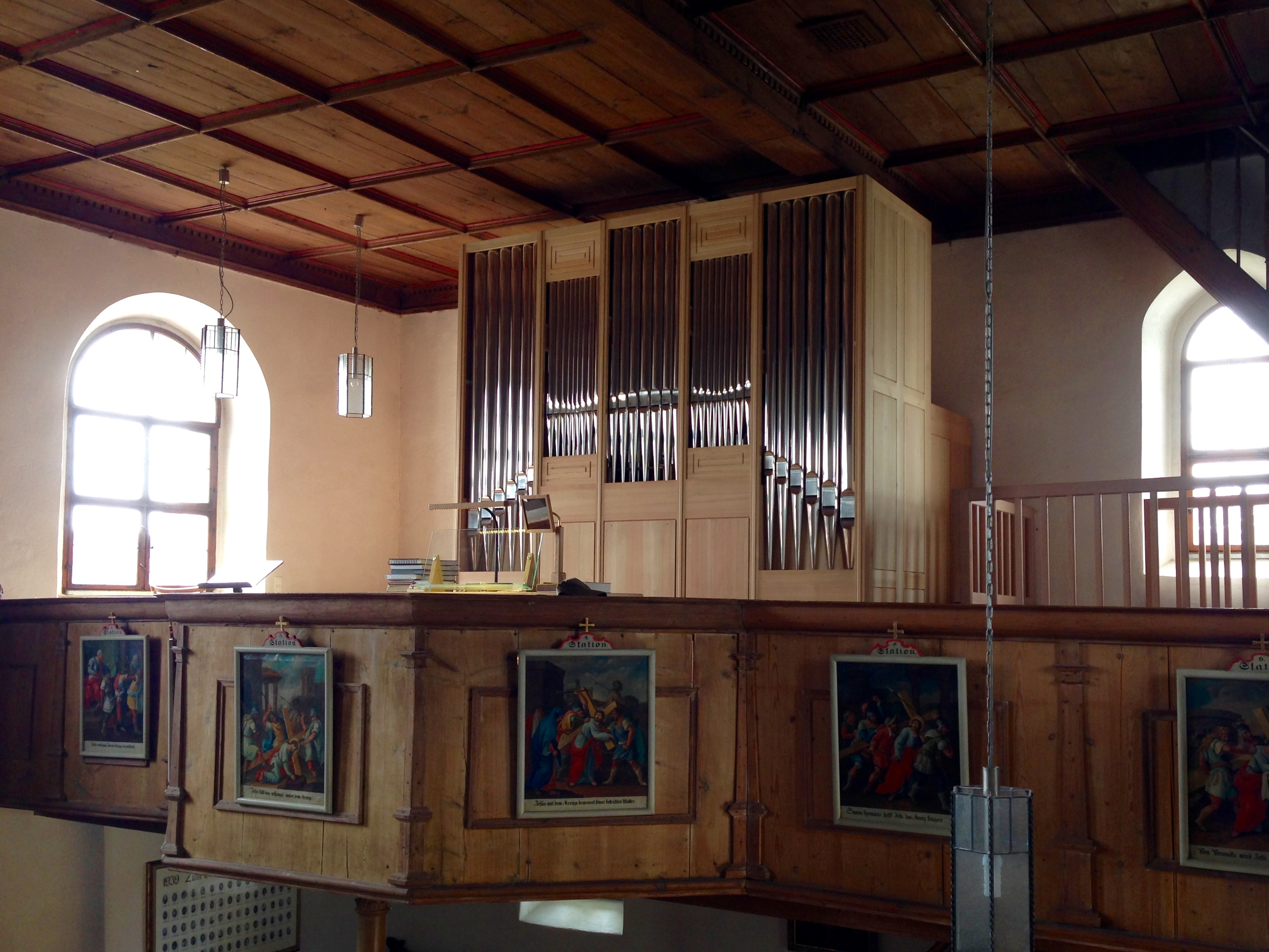 2014 von Sandtner erbaut